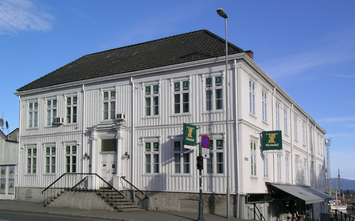 Thaulowgården, Olav Tryggvasonsgate 42, Trondheim.